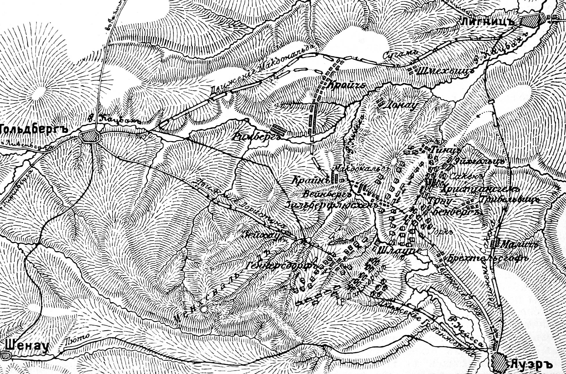 Это изображение было использовано для иллюстрирования статьи «Кацбах» опубликованной в двенадцатом томе «Военной энциклопедии», который был издан книгоиздательским товариществом И. Д. Сытина в 1913 году в столице Российской империи городе Санкт-Петербурге. Более подробное описание к этой картинке можно прочесть в указанной выше статье.